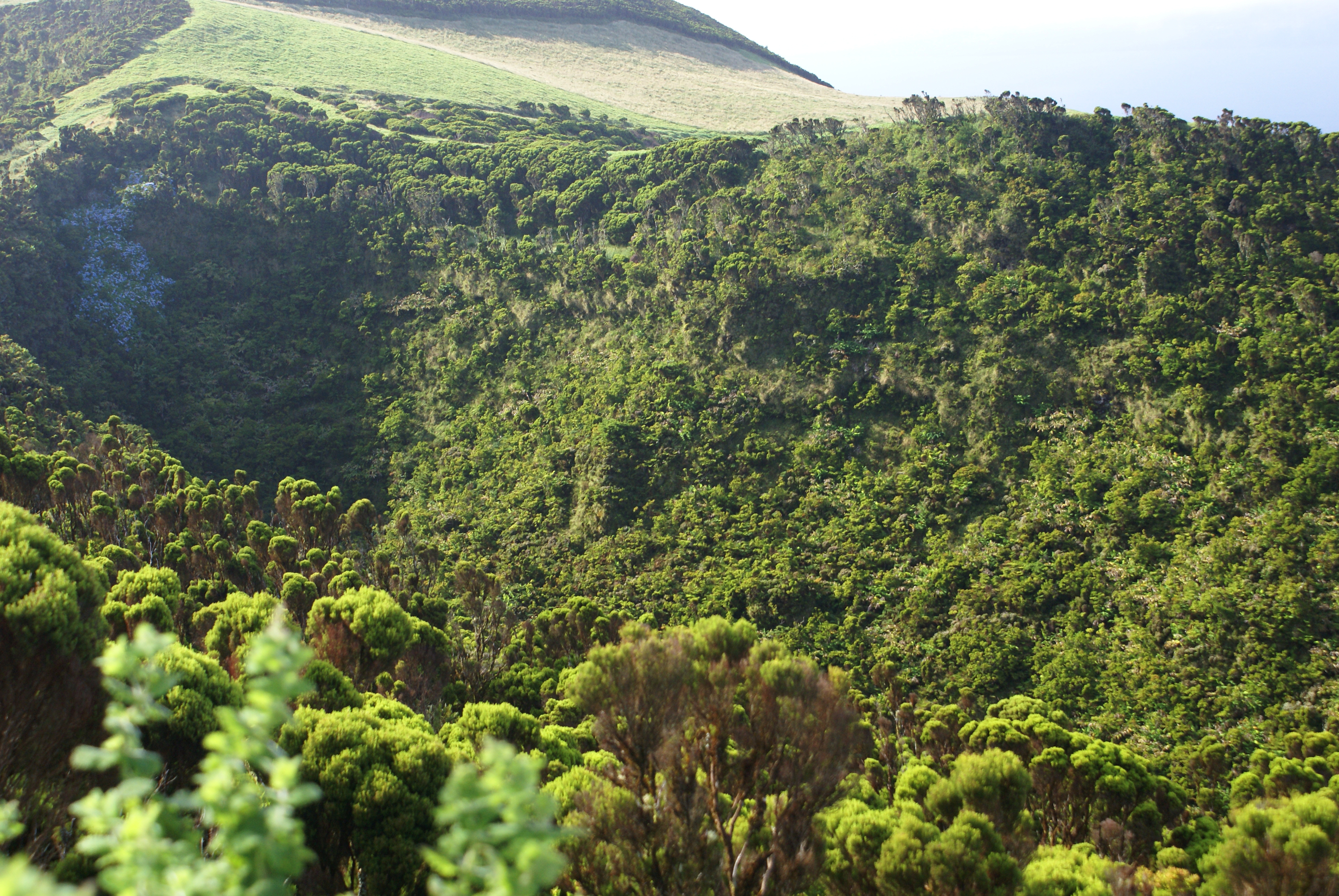 Cratera do vulcão da Urzelina, sítio localmente conhecido por “Bocas de Fogo da Urzelina”, Velas, ilha de São Jorge, Açores